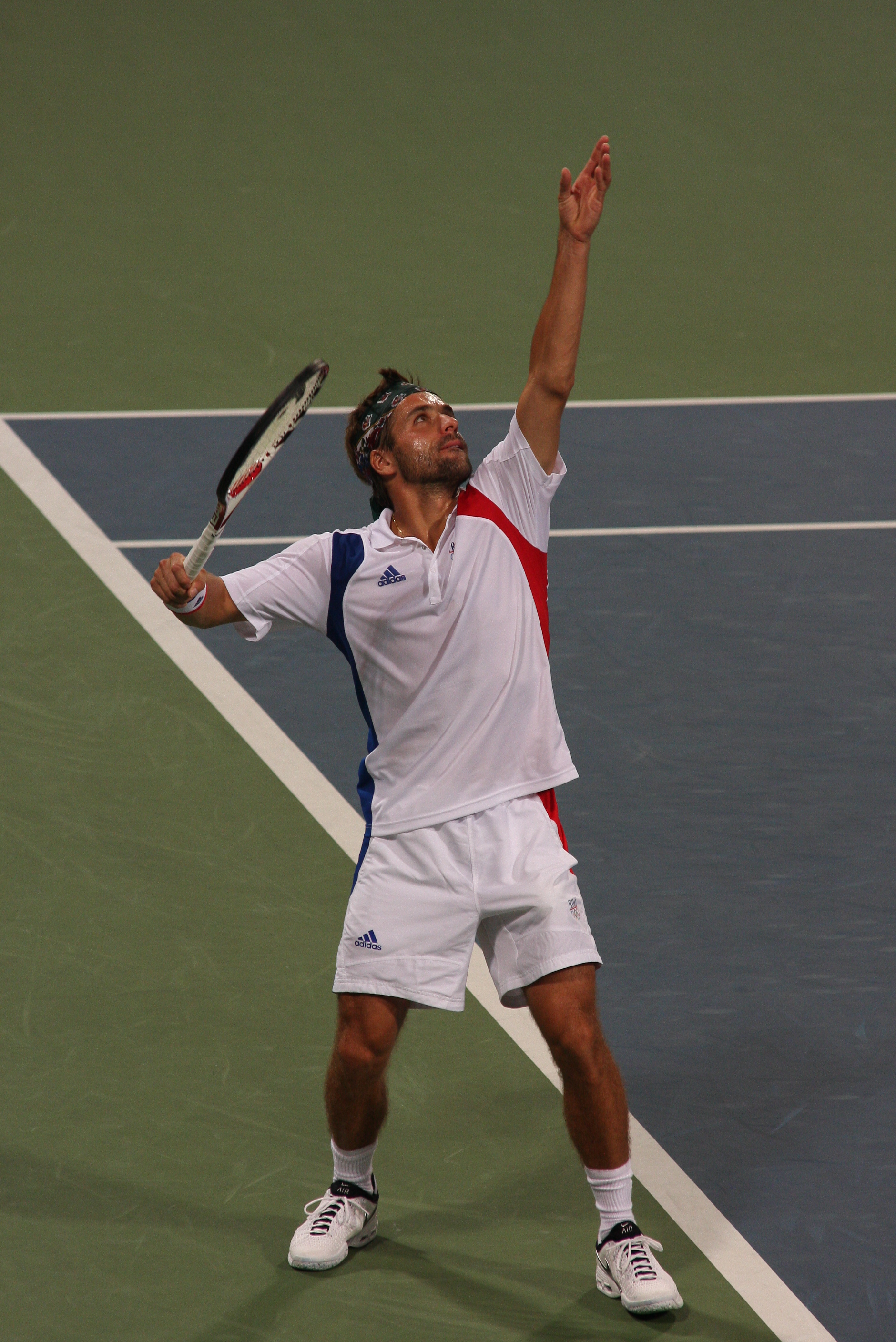 Arnaud Clément (associé à Michael Llodra) lors du match pour la troisième place contre les frères Bryan) aux des Jeux olympiques d'été de Pékin 2008.